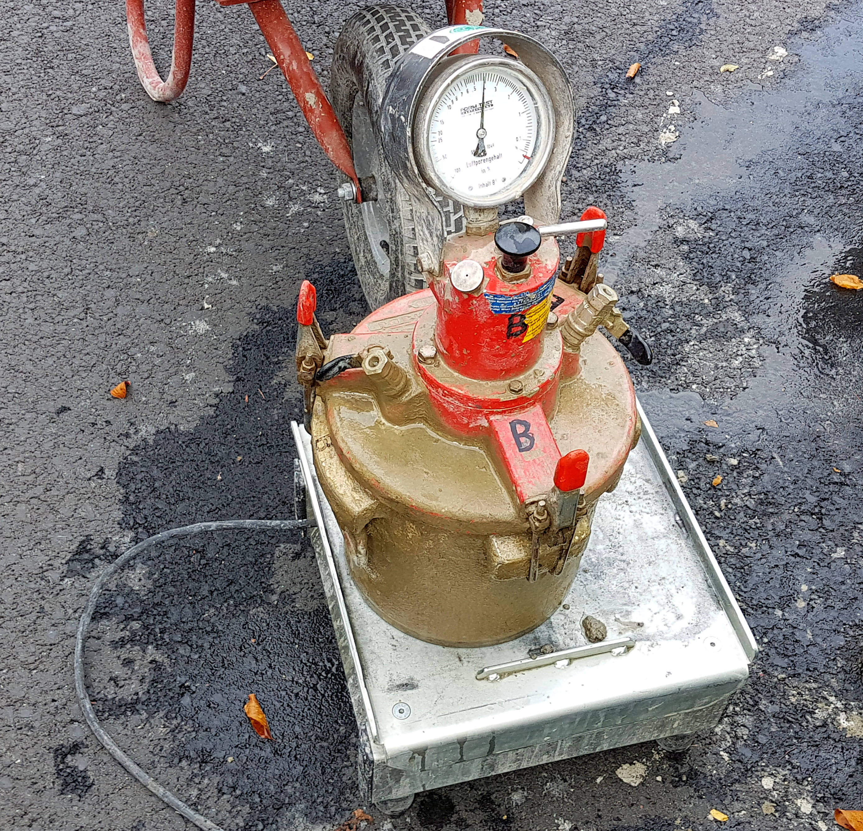 Messvorrichtungsapparatur zur Bestimmung des Luftporenanteils im Frischbeton